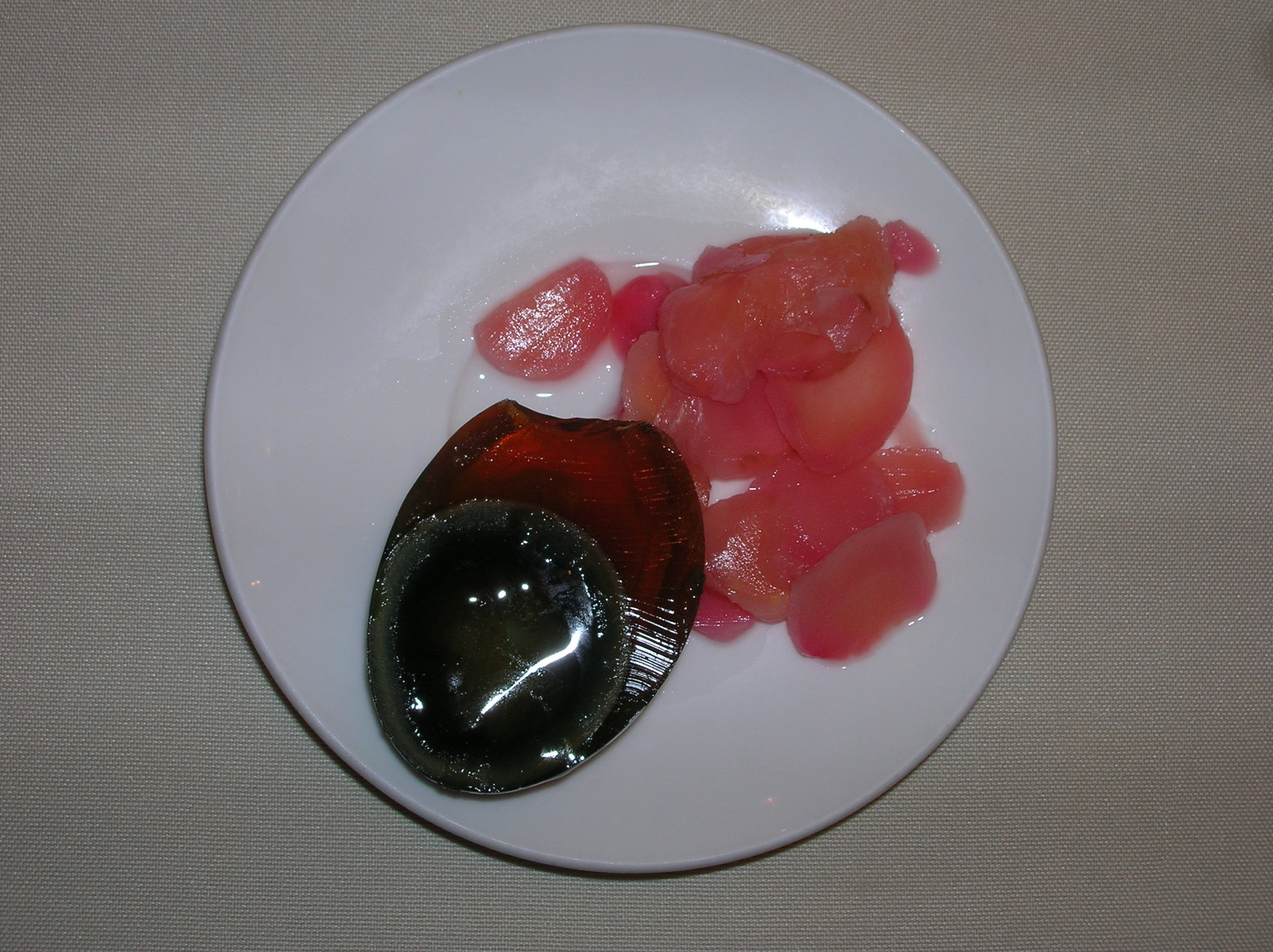 ביצת מאה השנים במסעדת יונג קי בהונג קונג